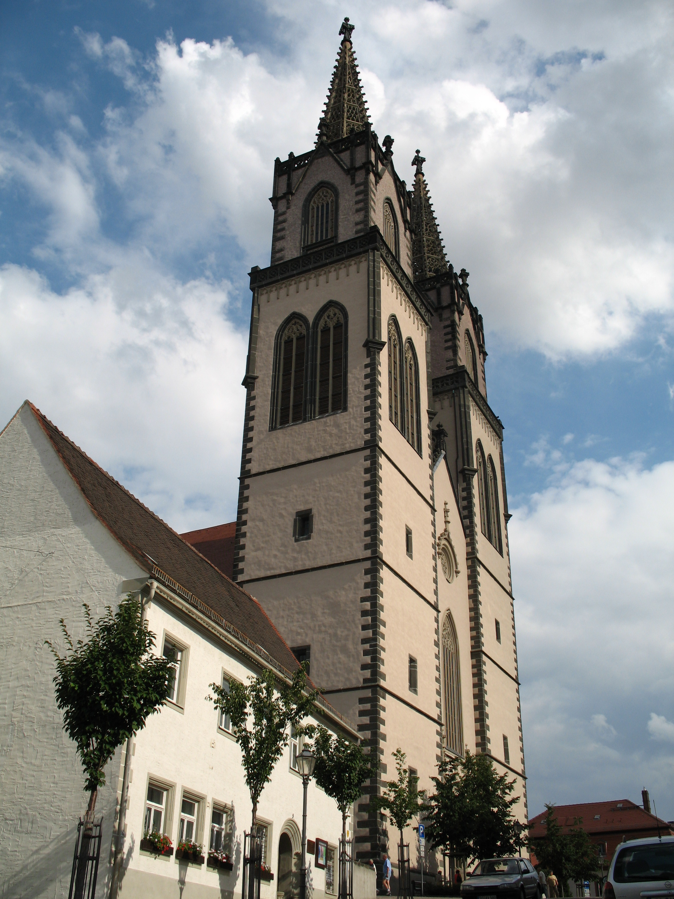 Church St. Aegidien in Oschatz, Saxony, Germany